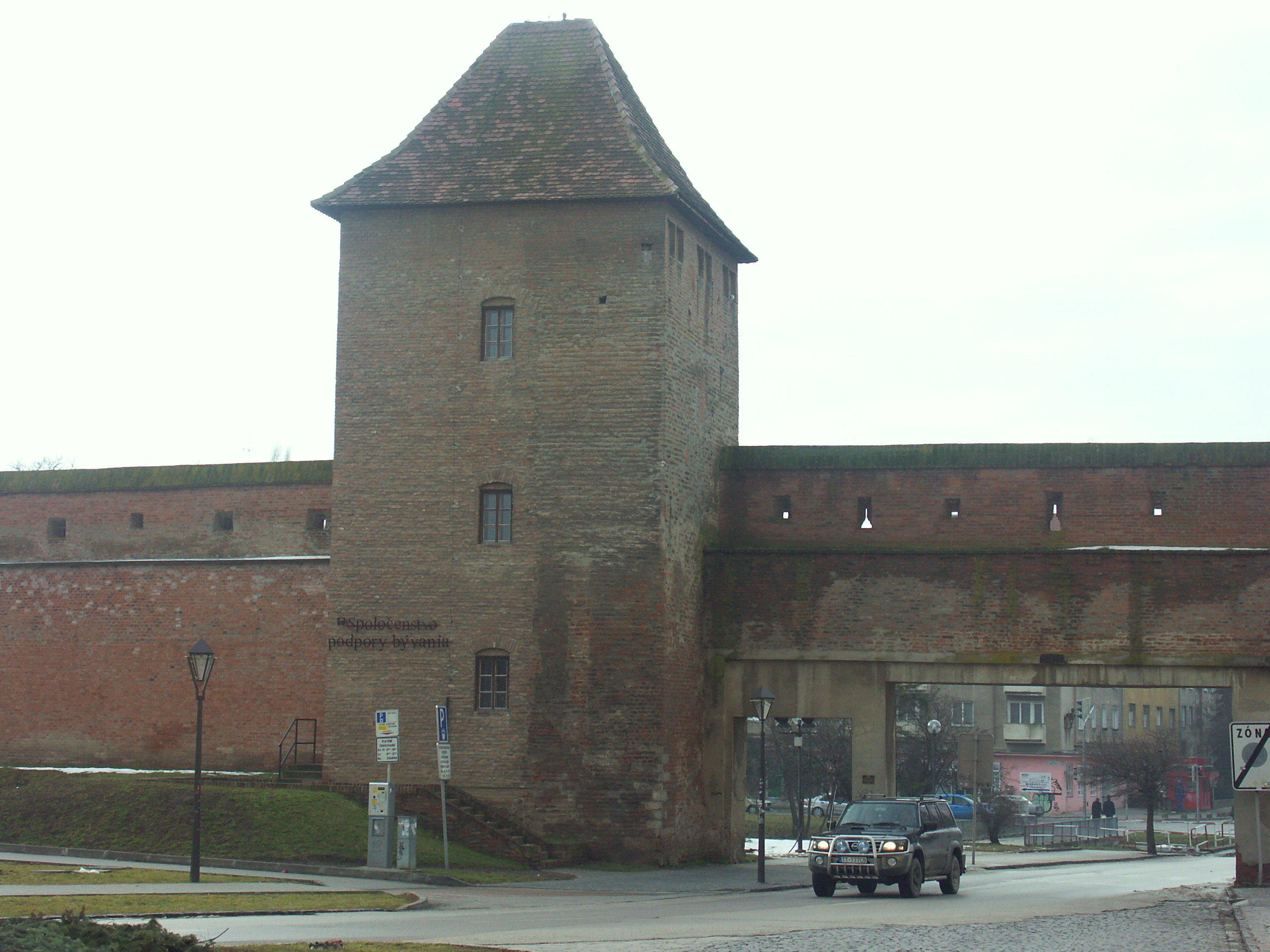 Author: Radovan Bahna, Slovakia Place: Slovakia, Trnava